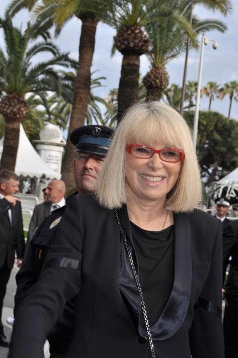 Mireille Darc au festival de Cannes